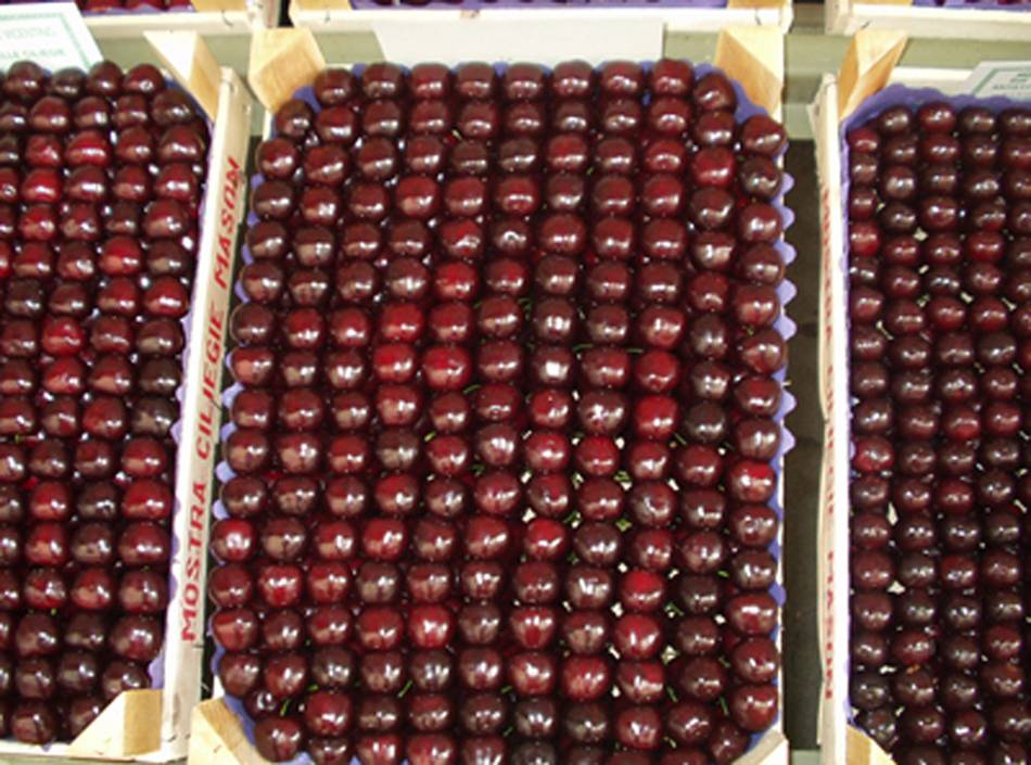 imballaggio delle ciliegie di Vignola in uso fino agli anni 1980